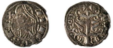 Dinero de Alfonso II de Aragón, el Casto. (1162-1196) Inscripción: Anverso: ARAGON, Reverso: ALFONS.REX